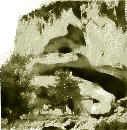 Saint-Michel-de-la-Nesque et ses deux grottes néolithiques